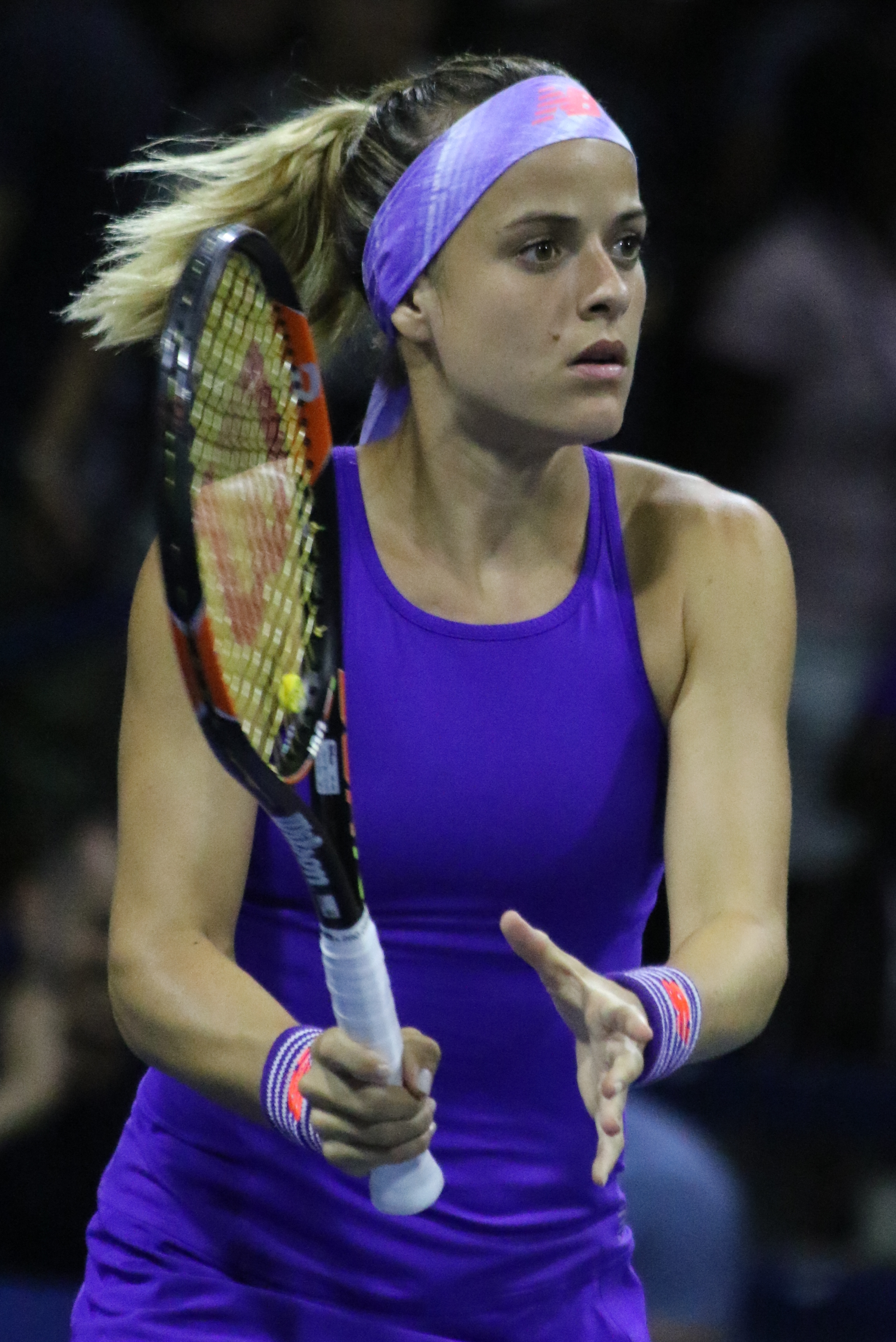 Gibbs US16 (23)